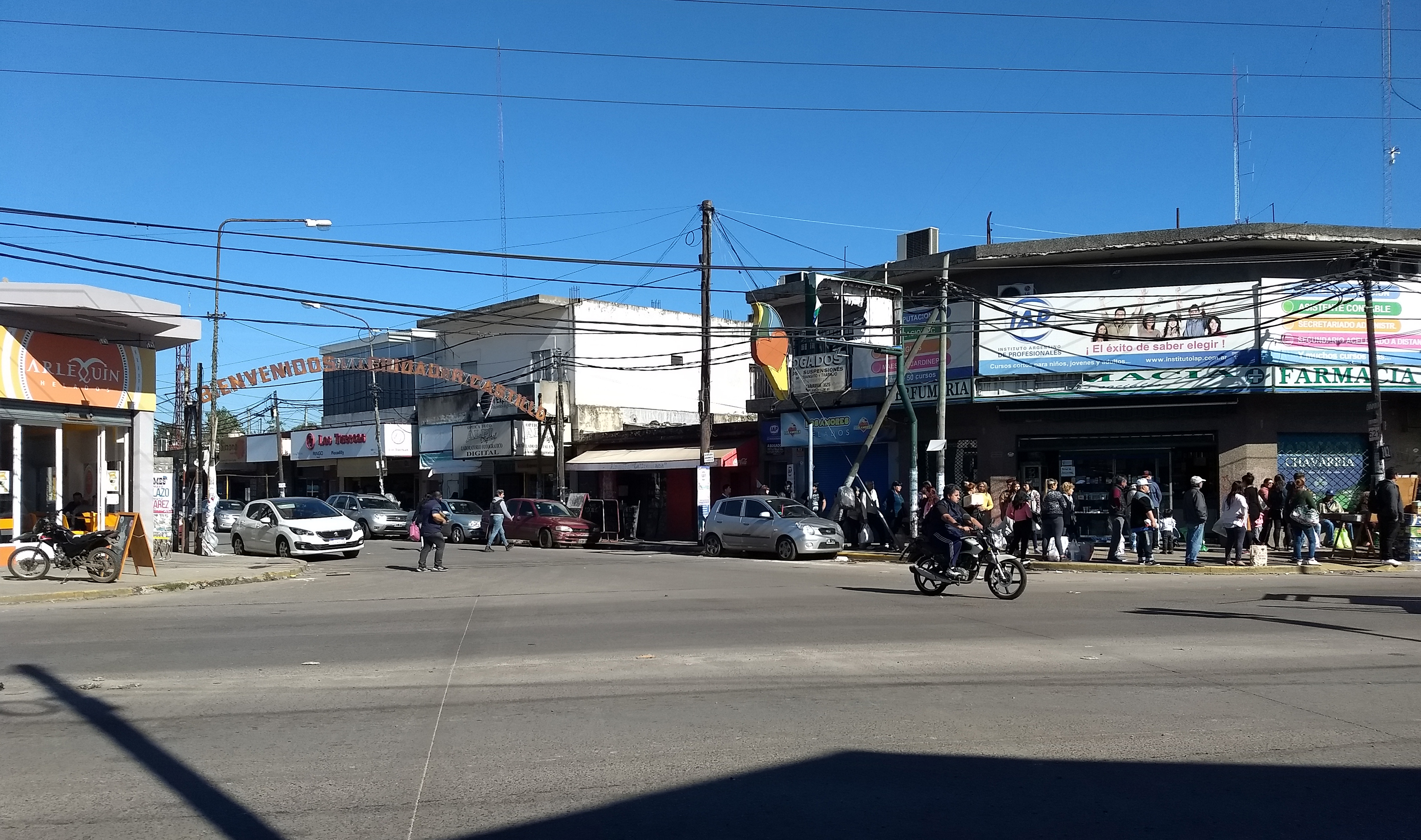 Avenida Carlos Casares (ruta provincial 17) y Chavarría, intersección en el centro comercial de Rafael Castillo.